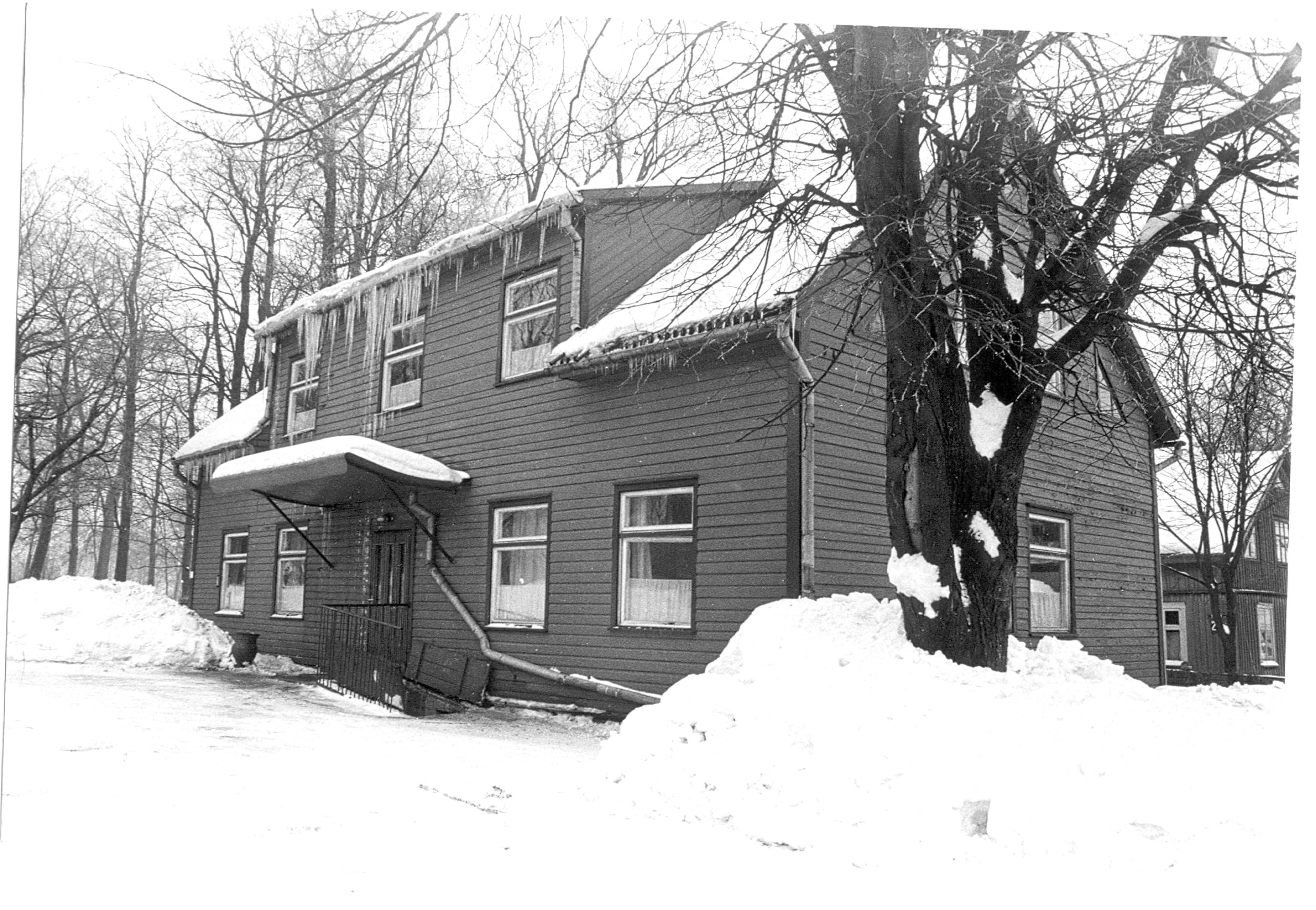 Sodo gatvės 5-asis pastatas prieš rekonstrukciją. XX a. VII-VIII deš.